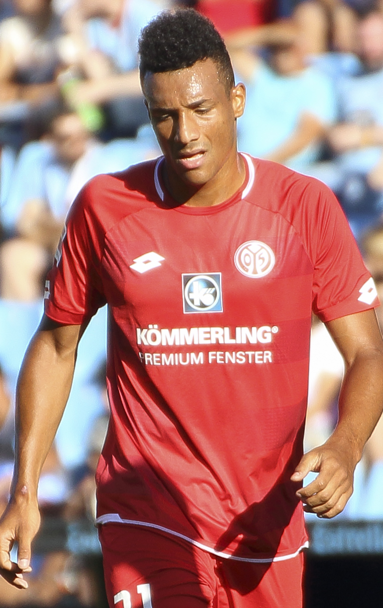 Presentación RC Celta - Temporada 18/19